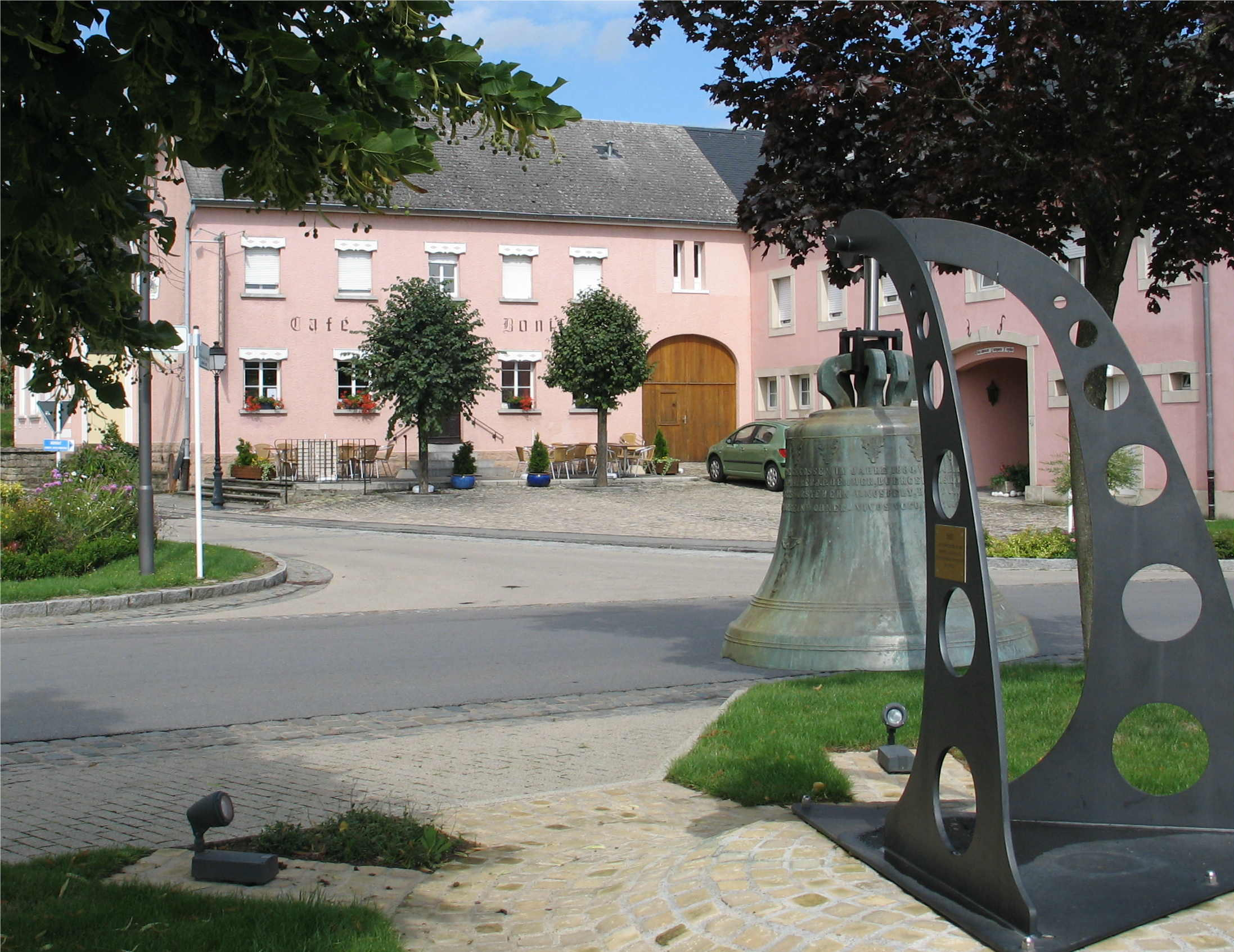 Am Duerf zu Nouspelt